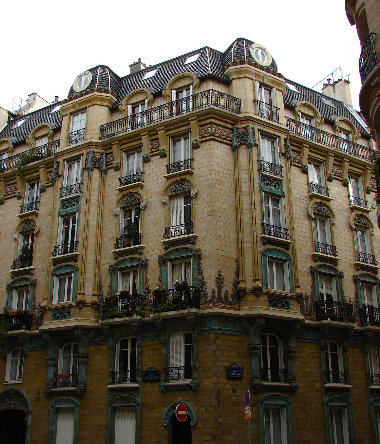 Immeuble "Les Chardons" Angle rue Claude Chahu et Eugène Manuel